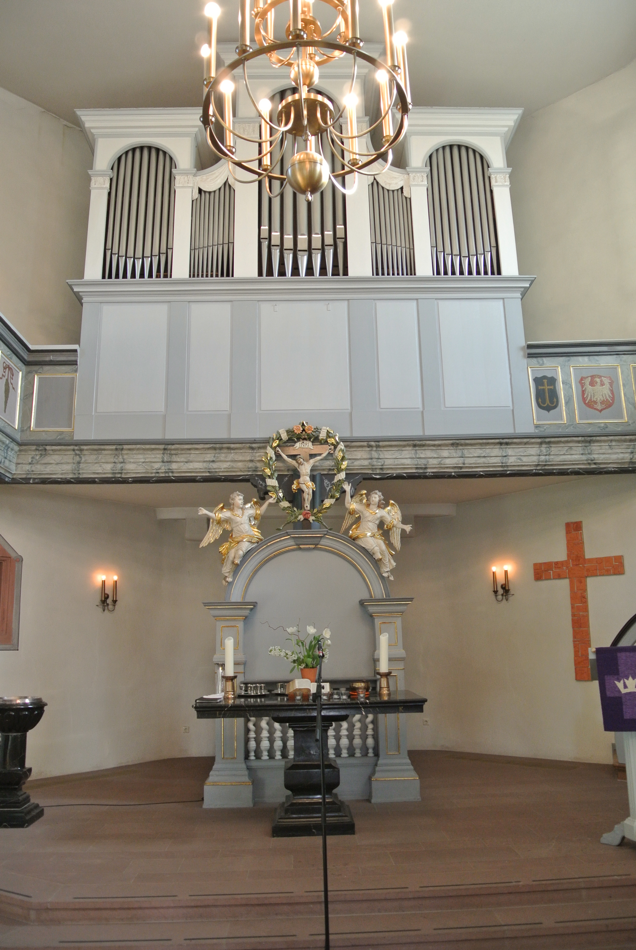 Evangelische Kirche in Frankfurt am Main-Bonames, barocke Saalkirche, Baumeister Arnolt Holtzhusen und Henne Wisse, Altar und Orgel